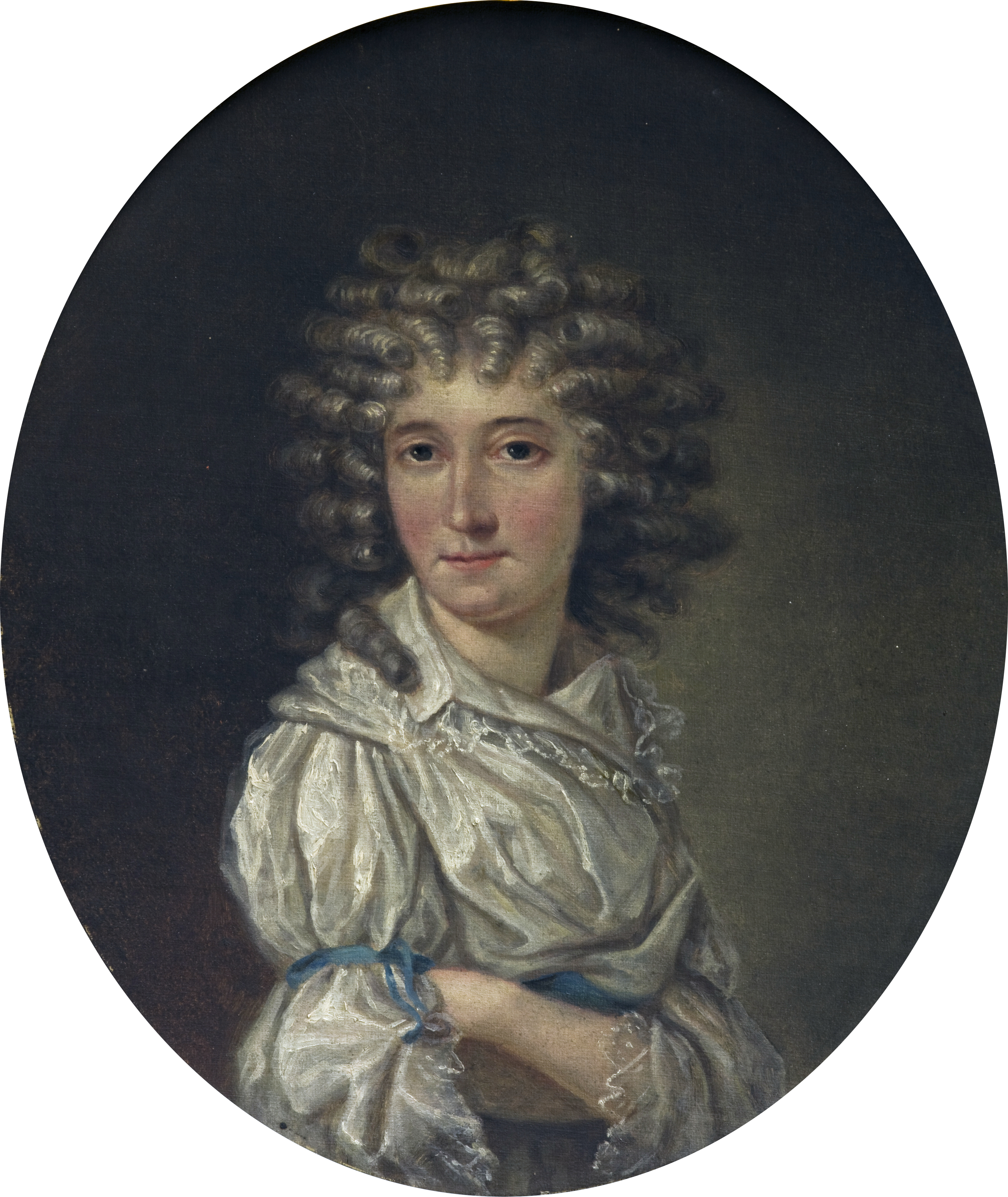 Беларуская (тарашкевіца): Партрэт Людвікі, дачкі Юзэфа Сасноўскага (Sasnoŭski)